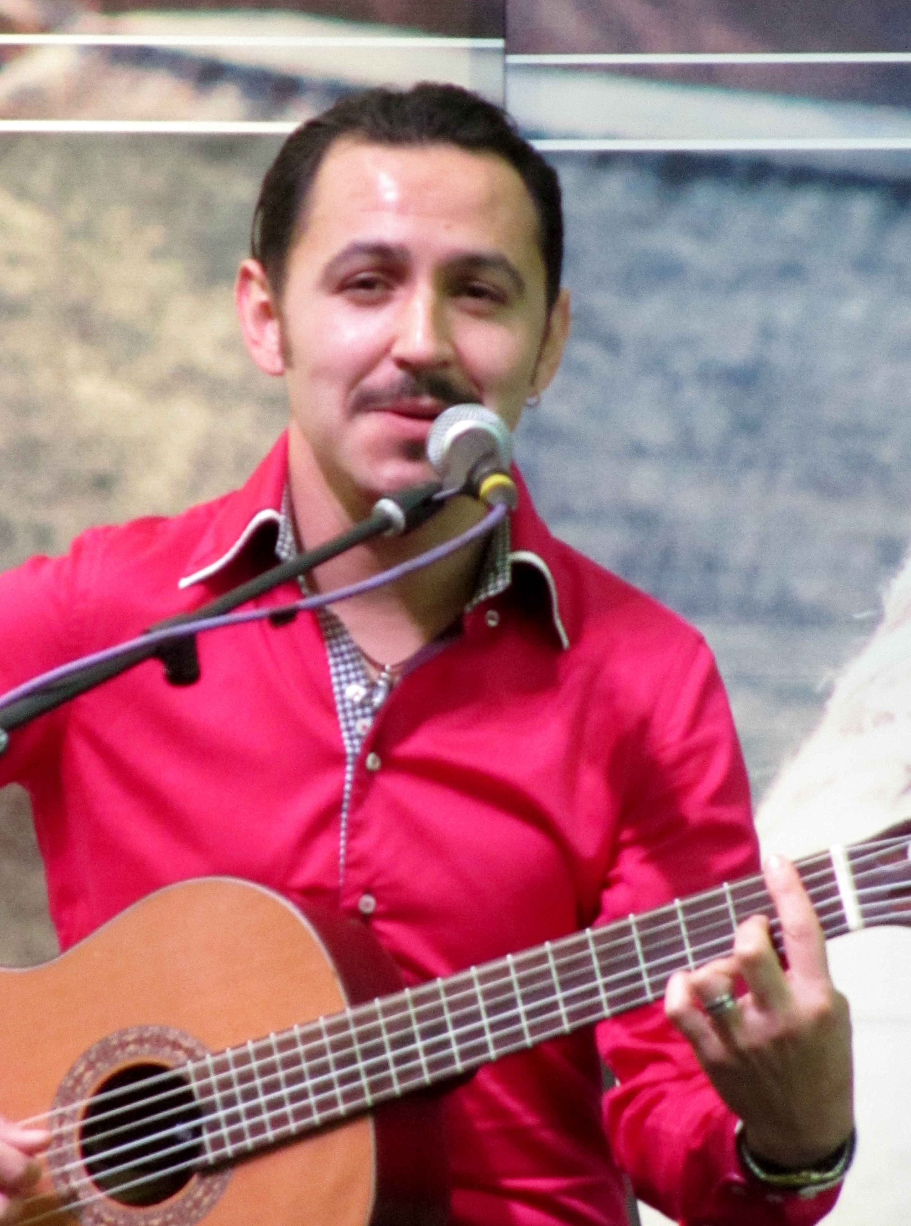 El cantante chileno Pablo Moraga, solista del grupo musical Juana, en la Feria Internacional del Libro de Santiago 2016